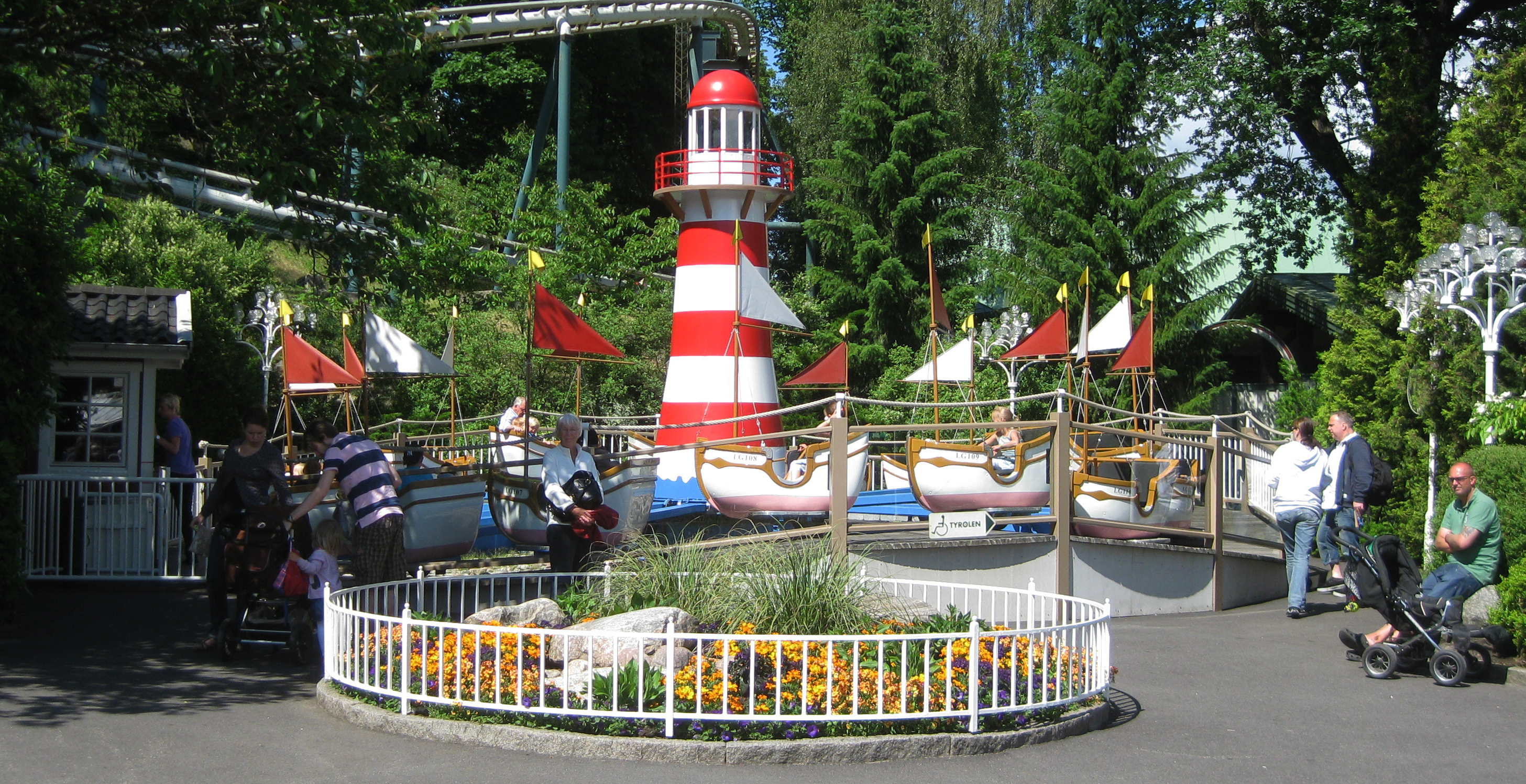 Fisketuren Liseberg, Göteborg.